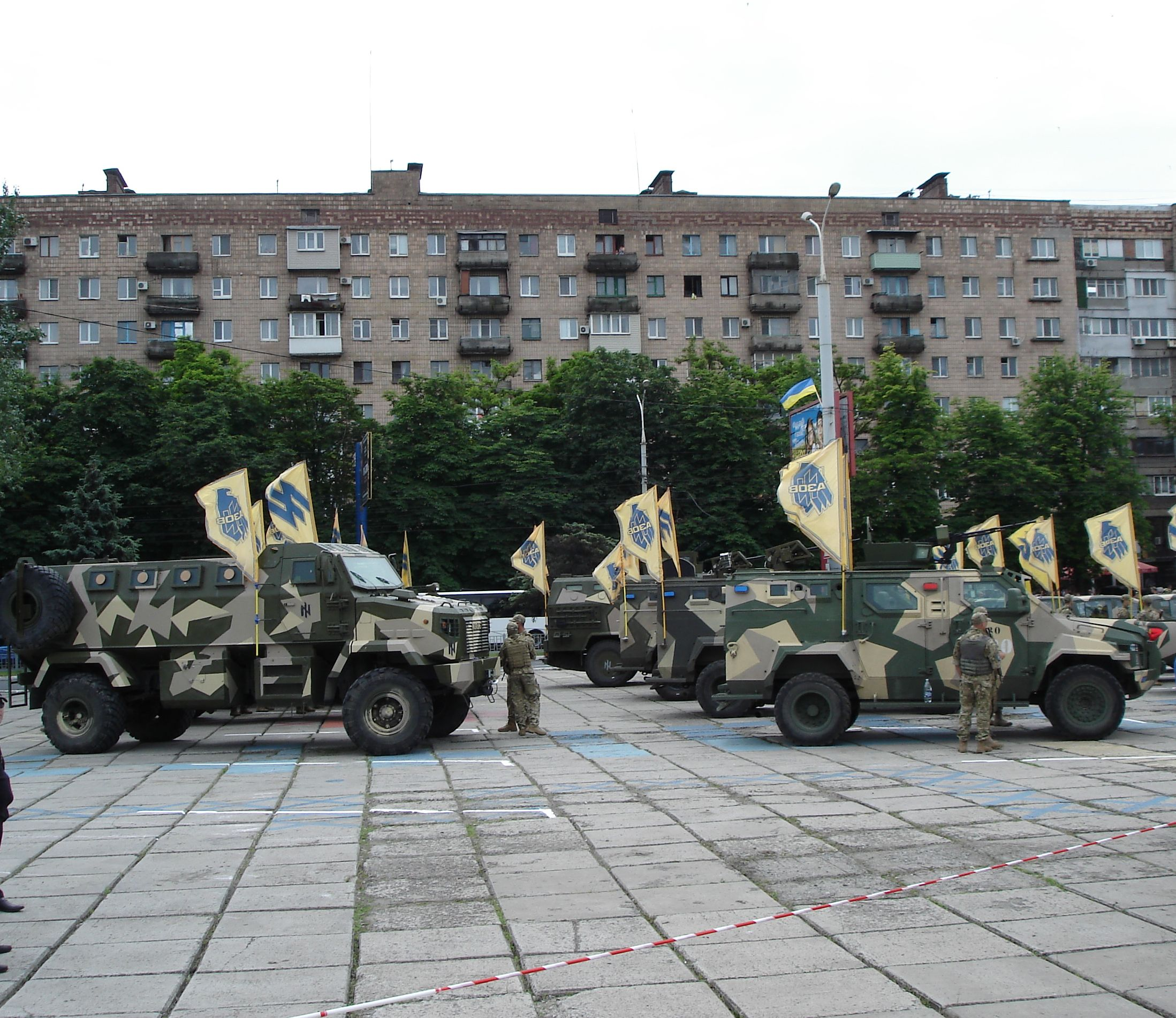 Техника полка Азов на площади Свободы, Мариуполь